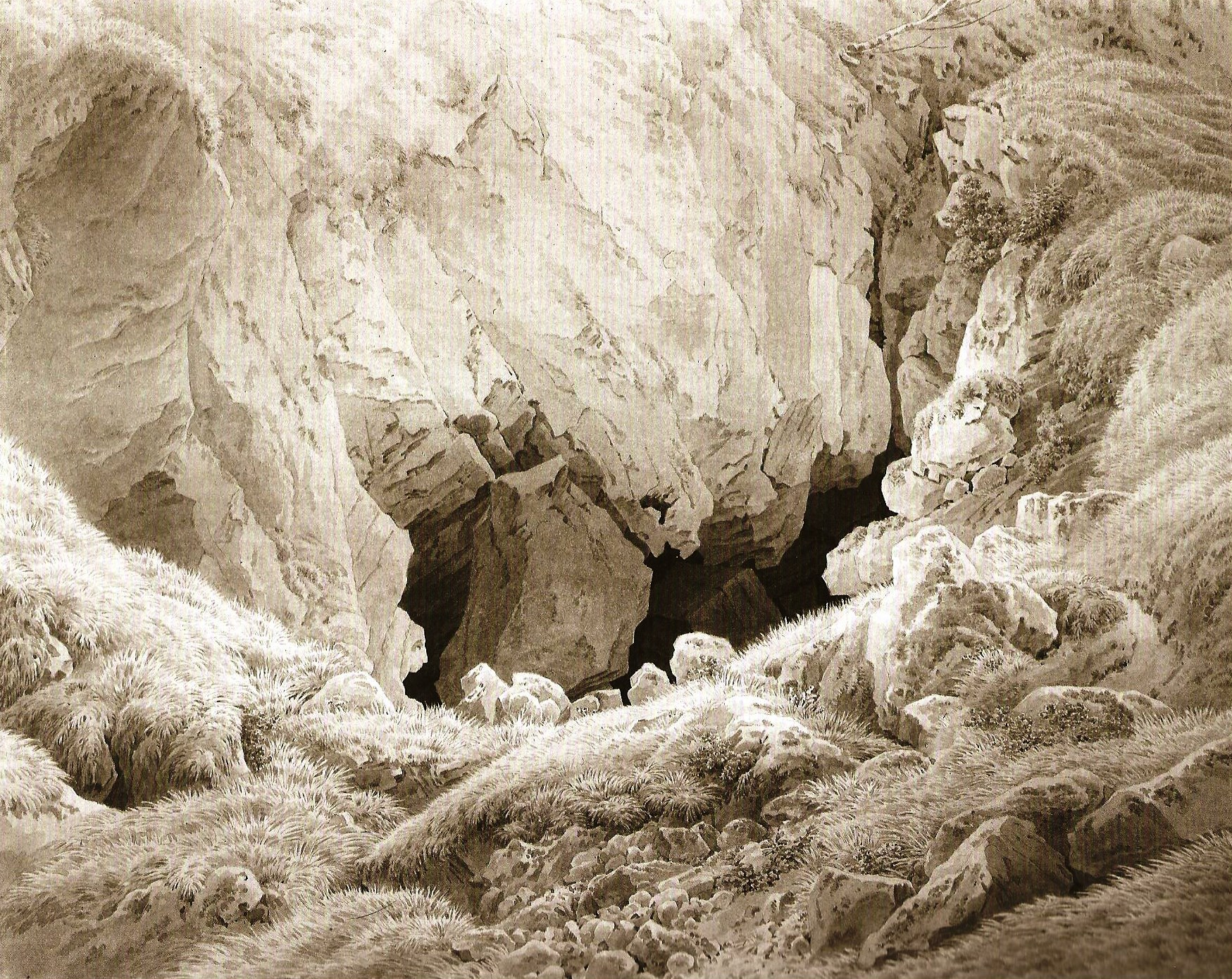 Harzhöhle, um 1811, Sepia, 34,5 x 43, cm